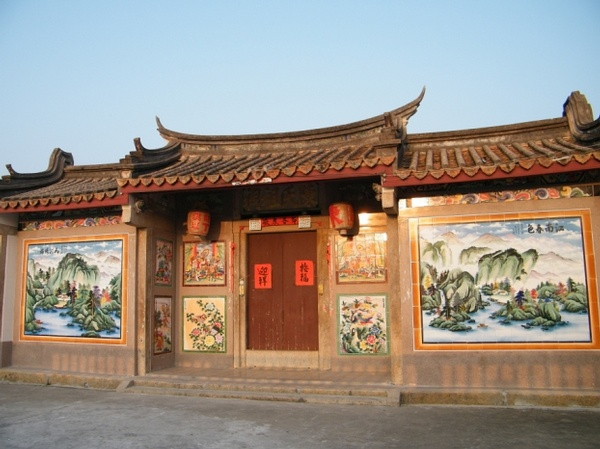 濠江区葛洲陈氏祖祠2